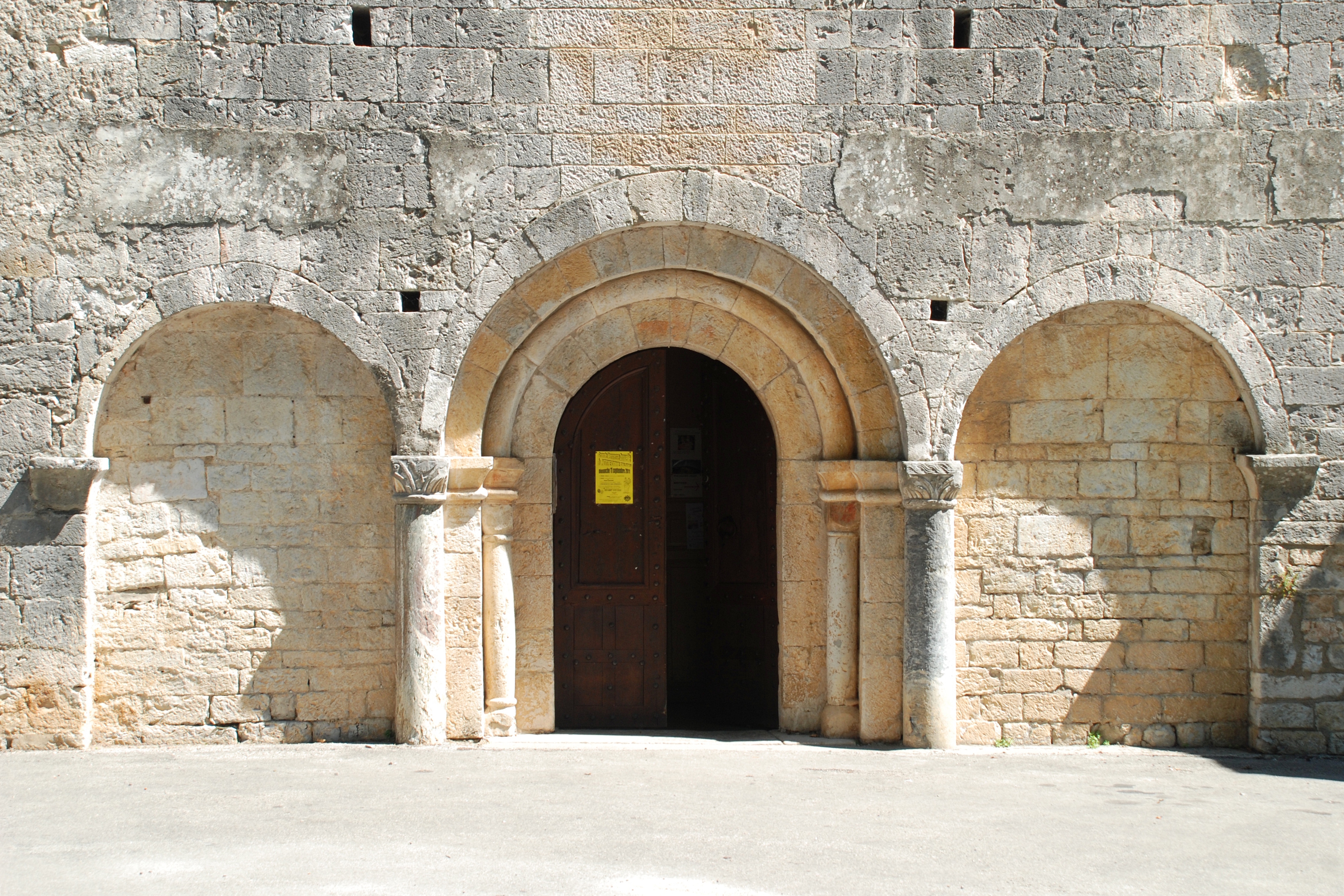 France - Hérault - Église Saint-Nazaire et Saint-Celse de Brissac